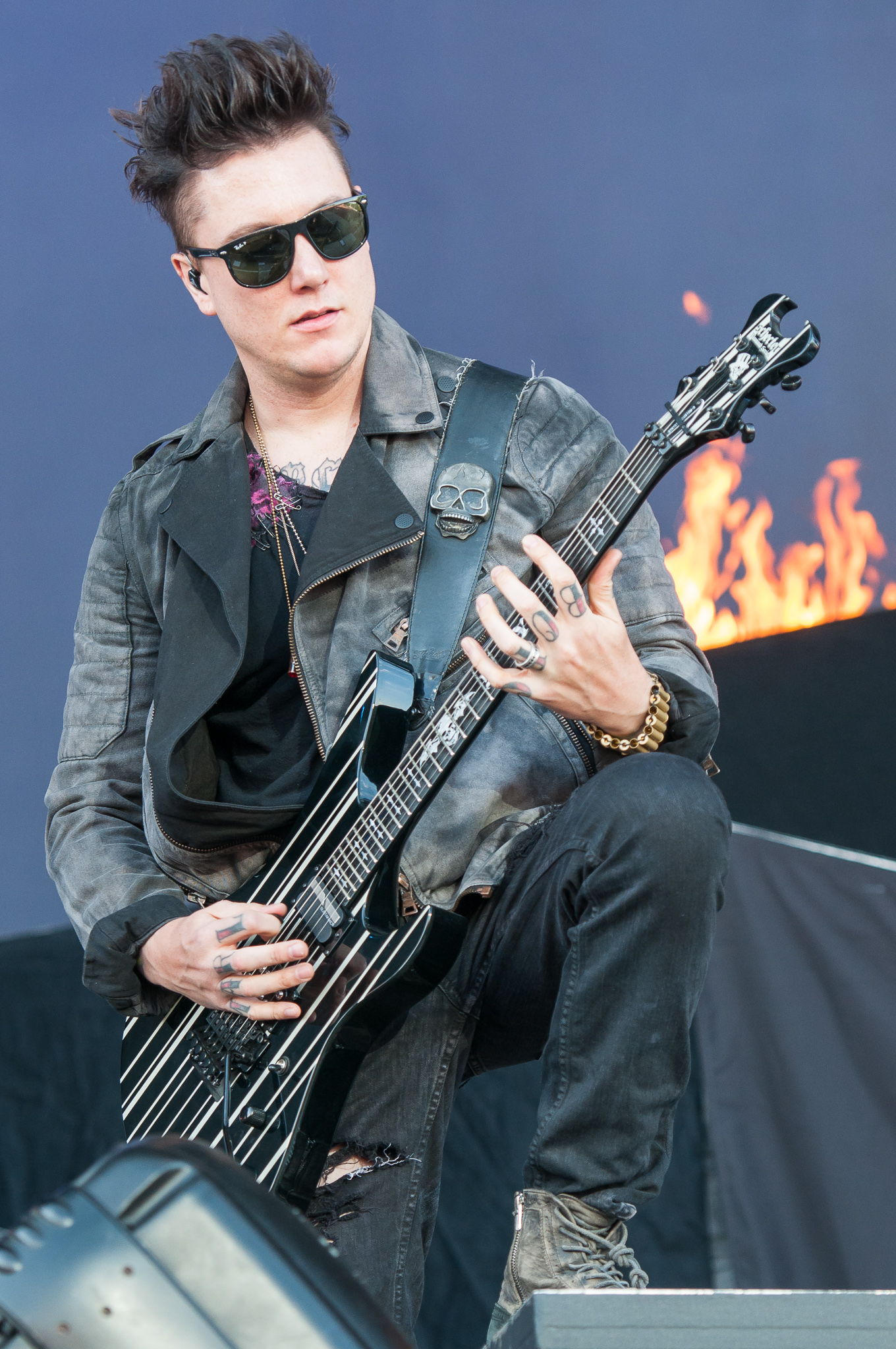 ARGO-Konzerte,Avenged Sevenfold,Brian Elwin Haner Jr.,Konzert,Livekonzert,Livemusik,Musik,RiP,Rock im Park 2014,Synyster Gates